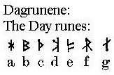 руны. сайт Арильда Хауге